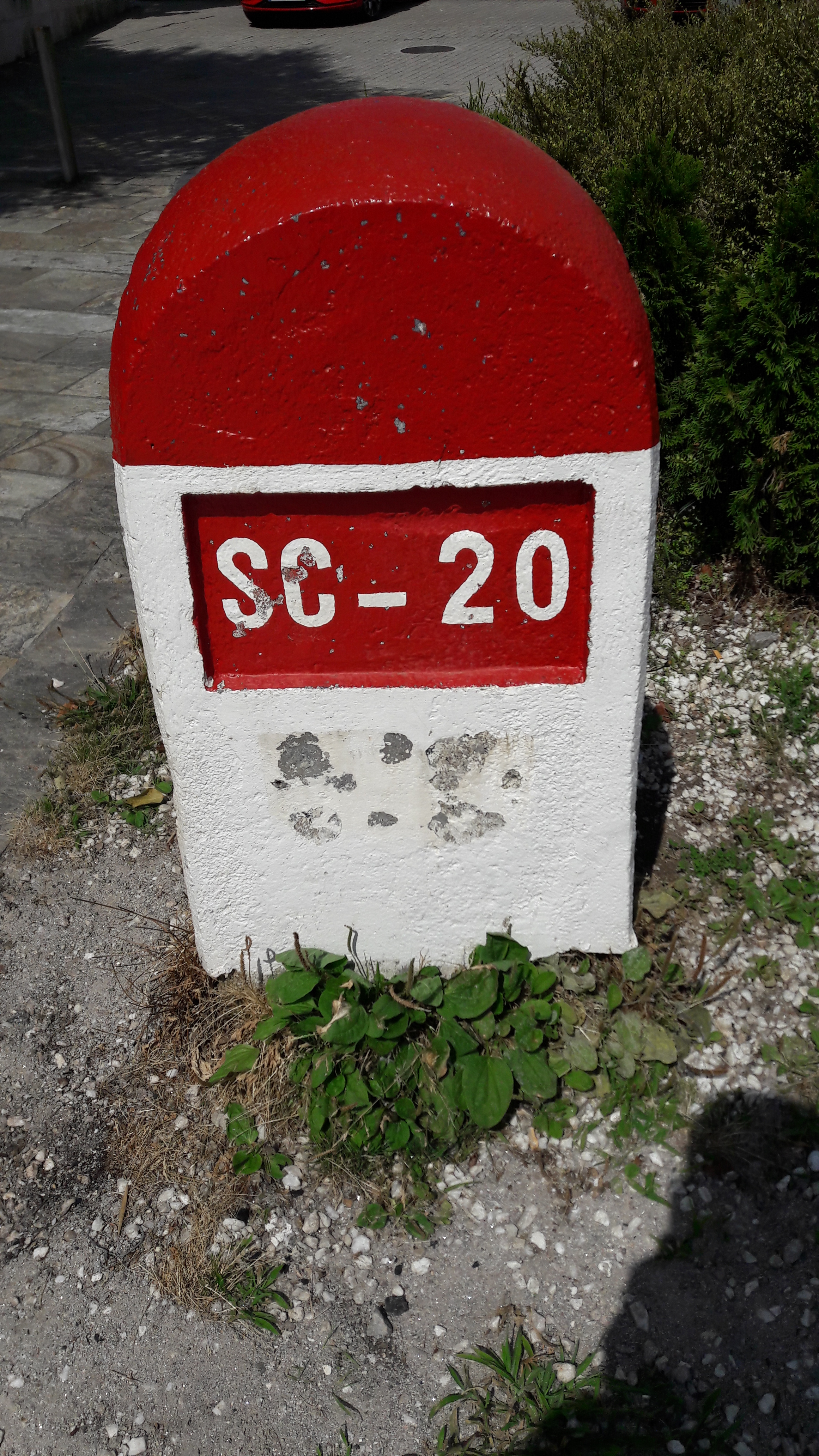 Fito da SC-20 en Conxo, Santiago de Compostela